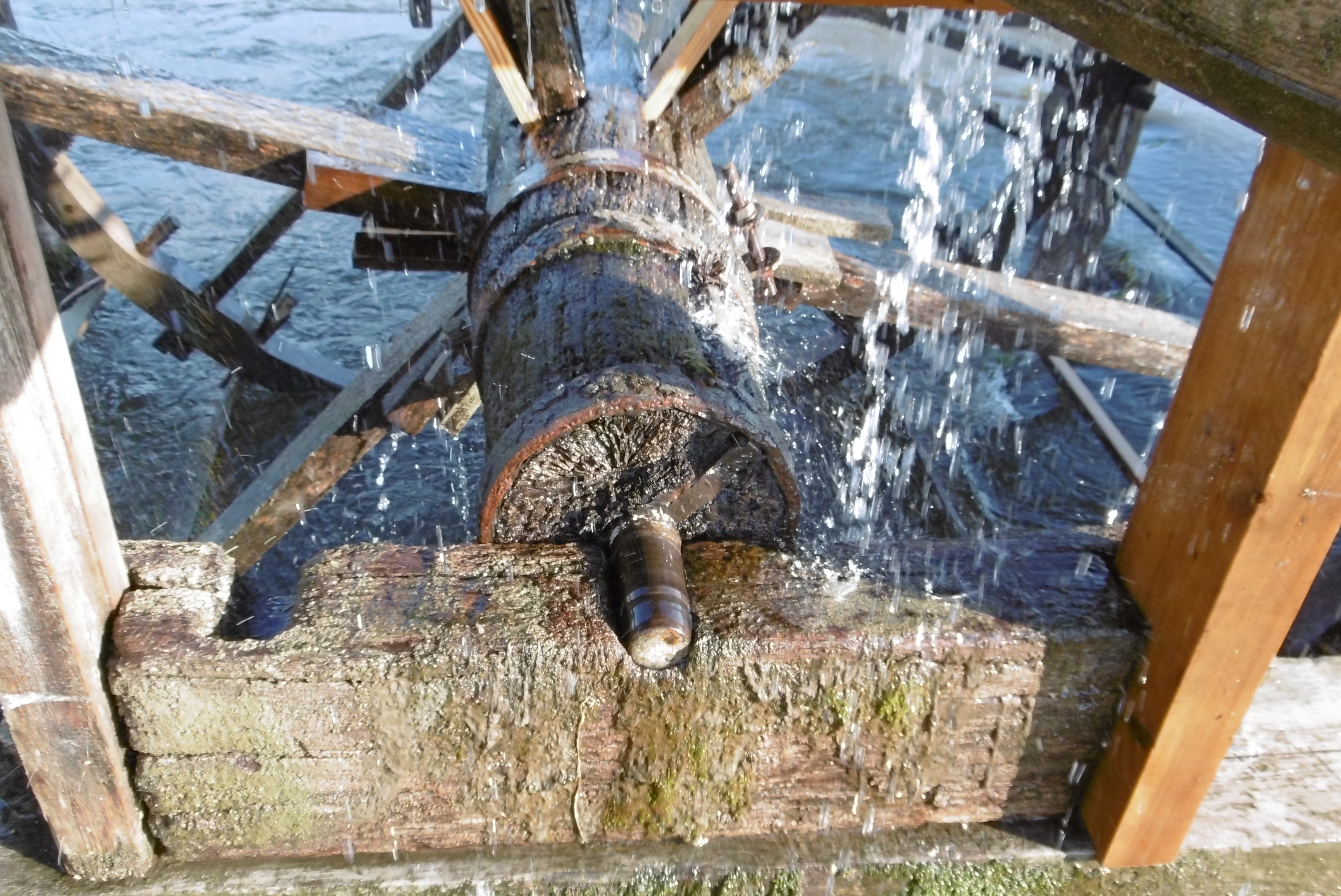 Wassergeschmiertes Wellenlager an Wasserschöpfrad in Möhrendorf